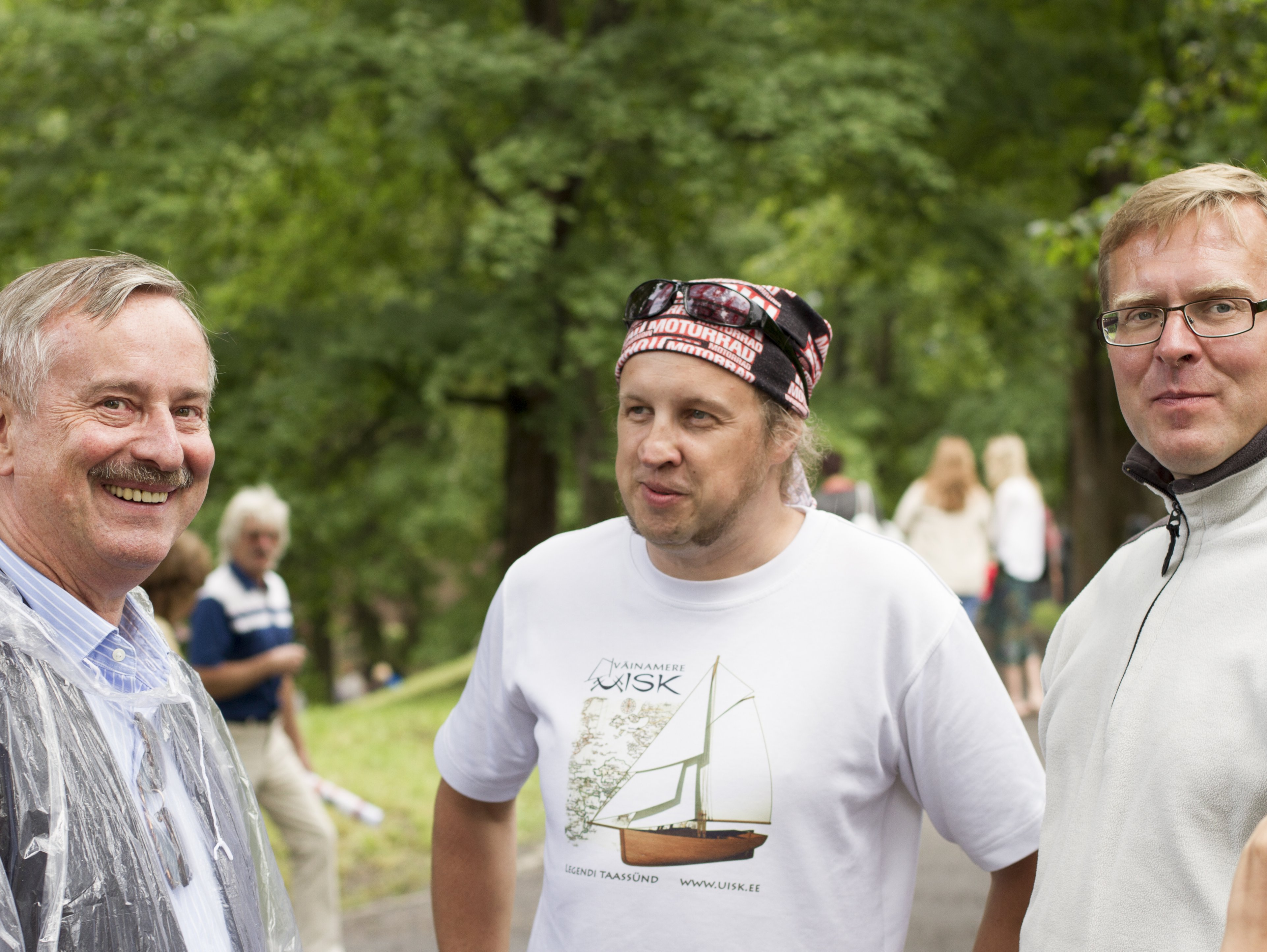 Arvamusfestival 2014